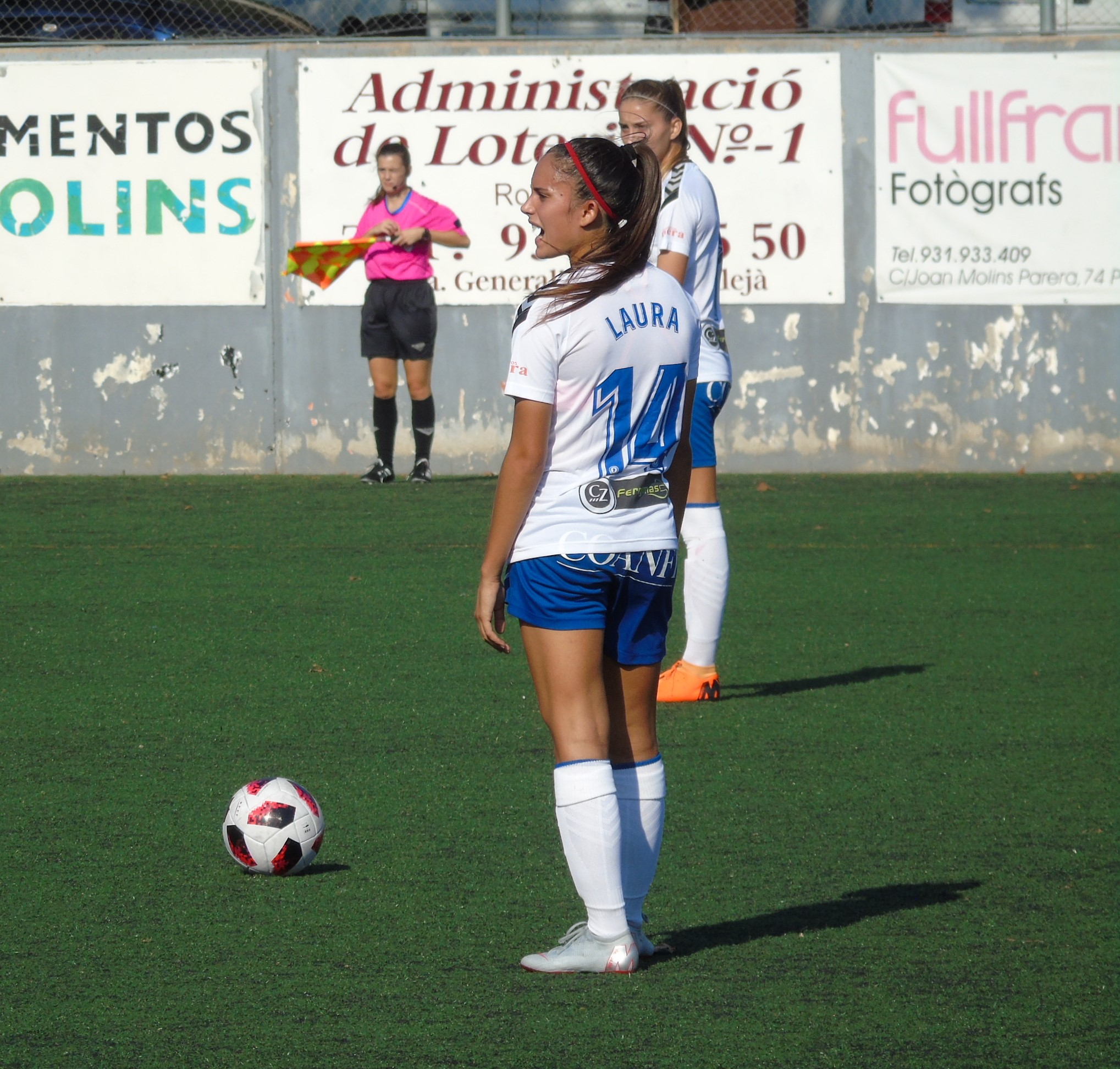 Laura Martinez, futbolista profesional femenina. Foto tomada durante el partido Palleja VS Zaragoza CFF